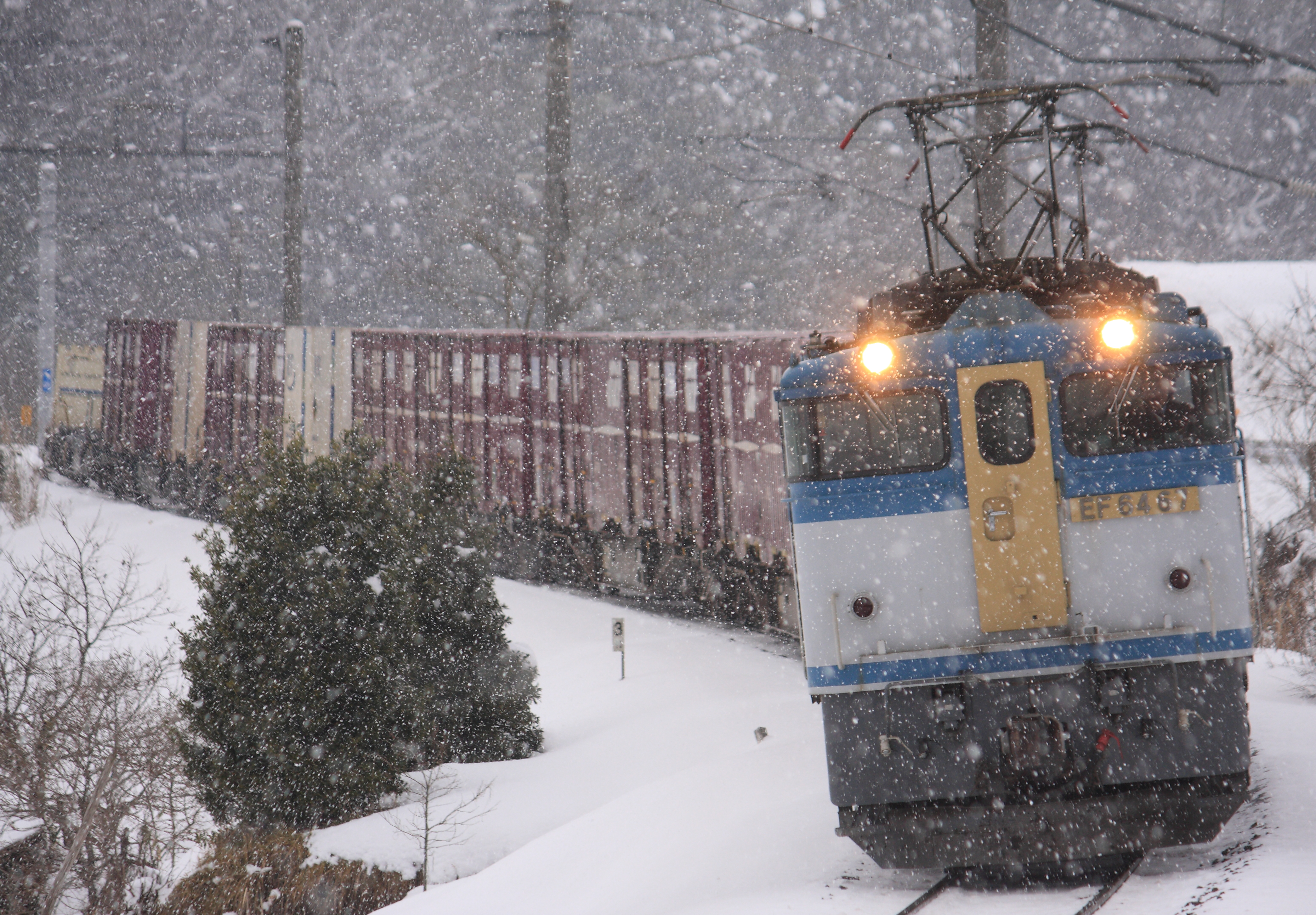 JR貨物EF64形電気機関車67号機、伯備線・上石見-下石見（信）